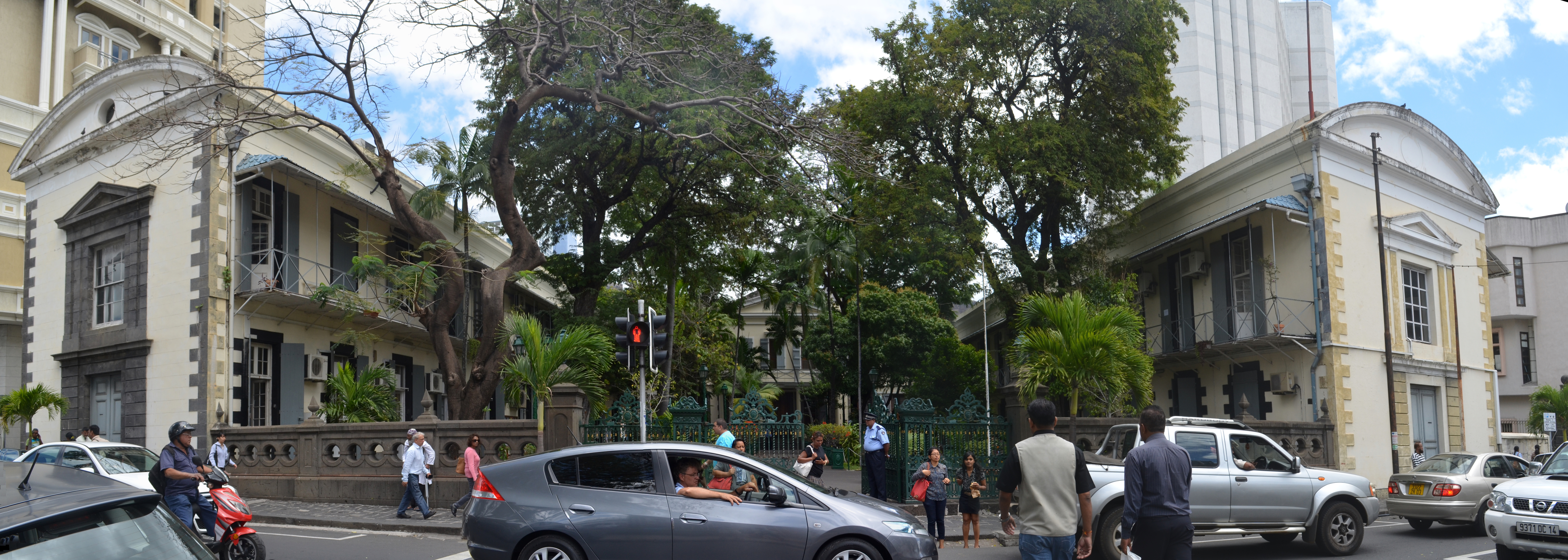 Port Louis, Supreme Court